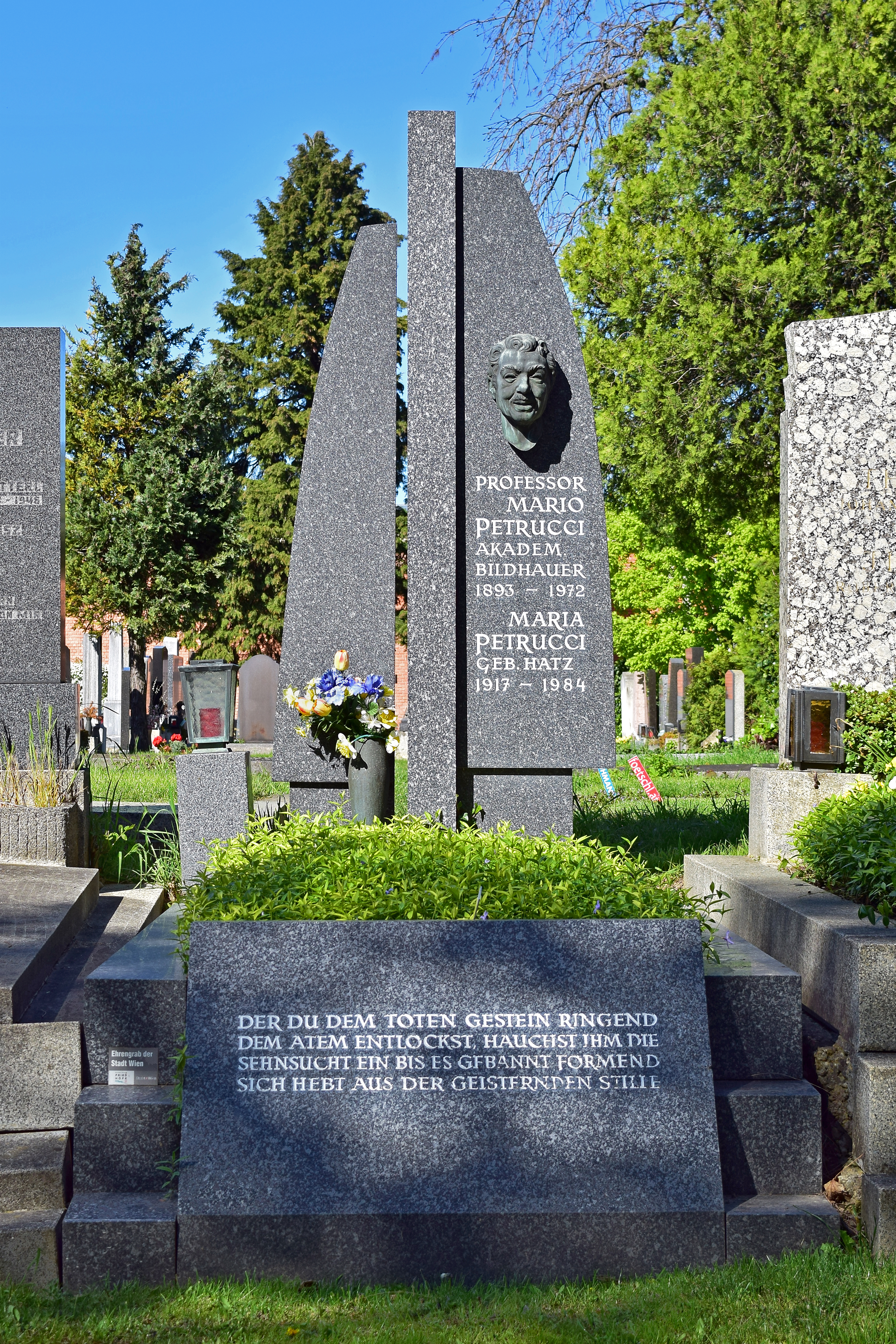 Ehrenhalber gewidmetes Grab von Mario Petrucci auf dem Wiener Zentralfriedhof.